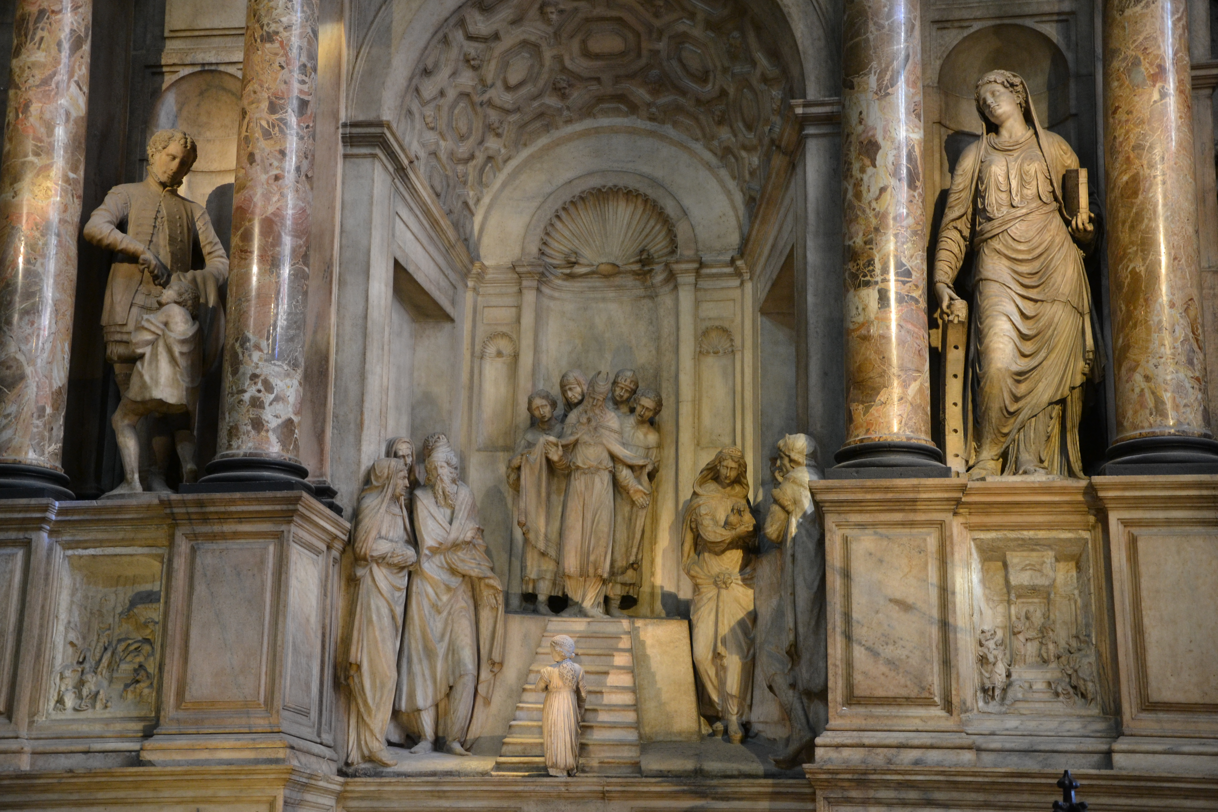 Duomo di Milano, transetto destro, Altare del Bambaia, Presentazione di Maria al Tempio (1543)